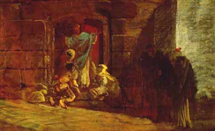 Szenenentwurf zu "Paulus", Szenisches Oratorium (Mendelssohn-Bartholdy) - Tempel; Düsseldorf 1870; Öl auf Leinwand; 35,5 x 57 cm; Theaterwissenschaftliche Sammlung der Universität zu Köln (Schloss Wahn), Inv.-Nr. 1535 c